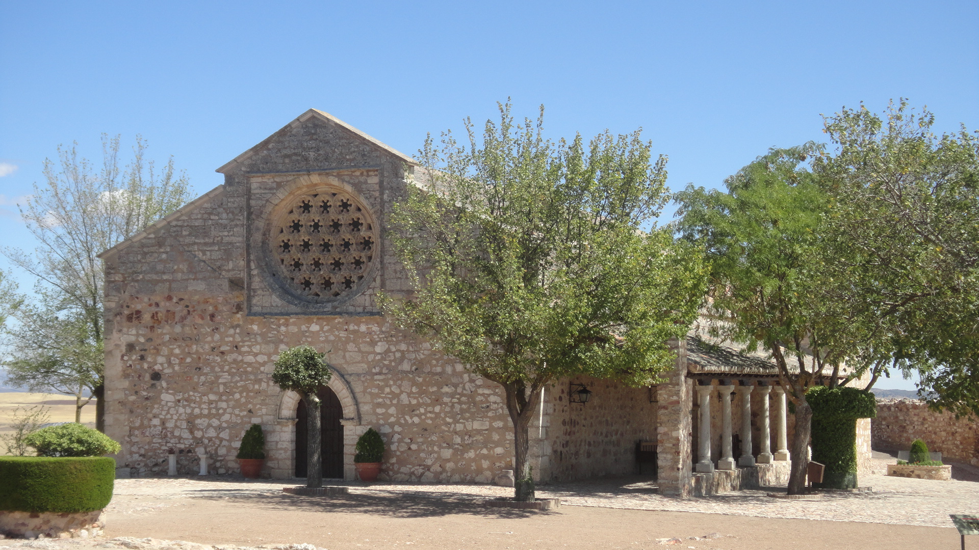 Ermita de la Virgen de Alarcos, en el yacimiento arqueológico de Alarcos (provincia de Ciudad Real - España.)